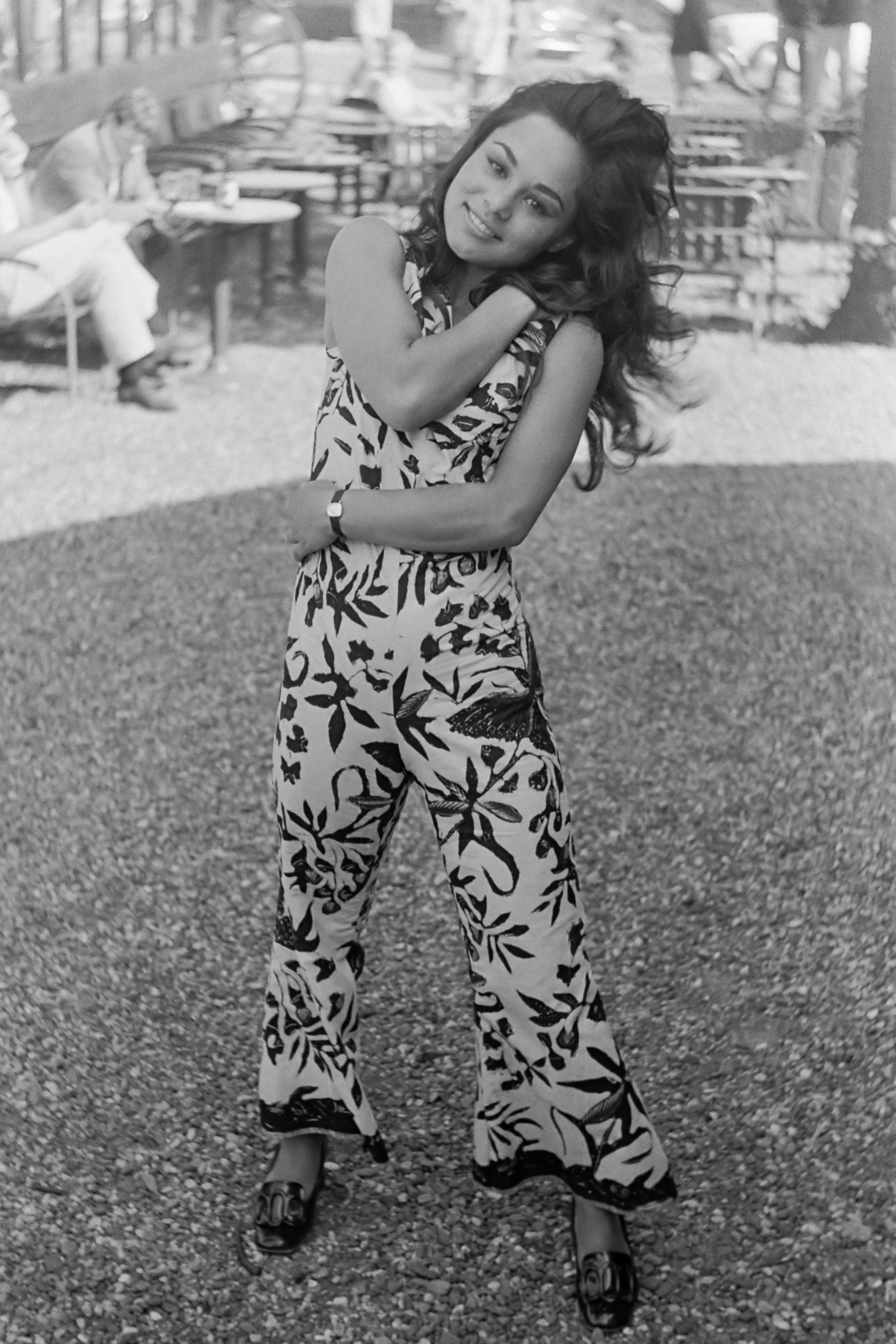 Knokkeploeg voorgesteld te Amsterdam voor het Knokke Songfestival nr. 24 25: Annet Hesterman , kop 11 juni 1969